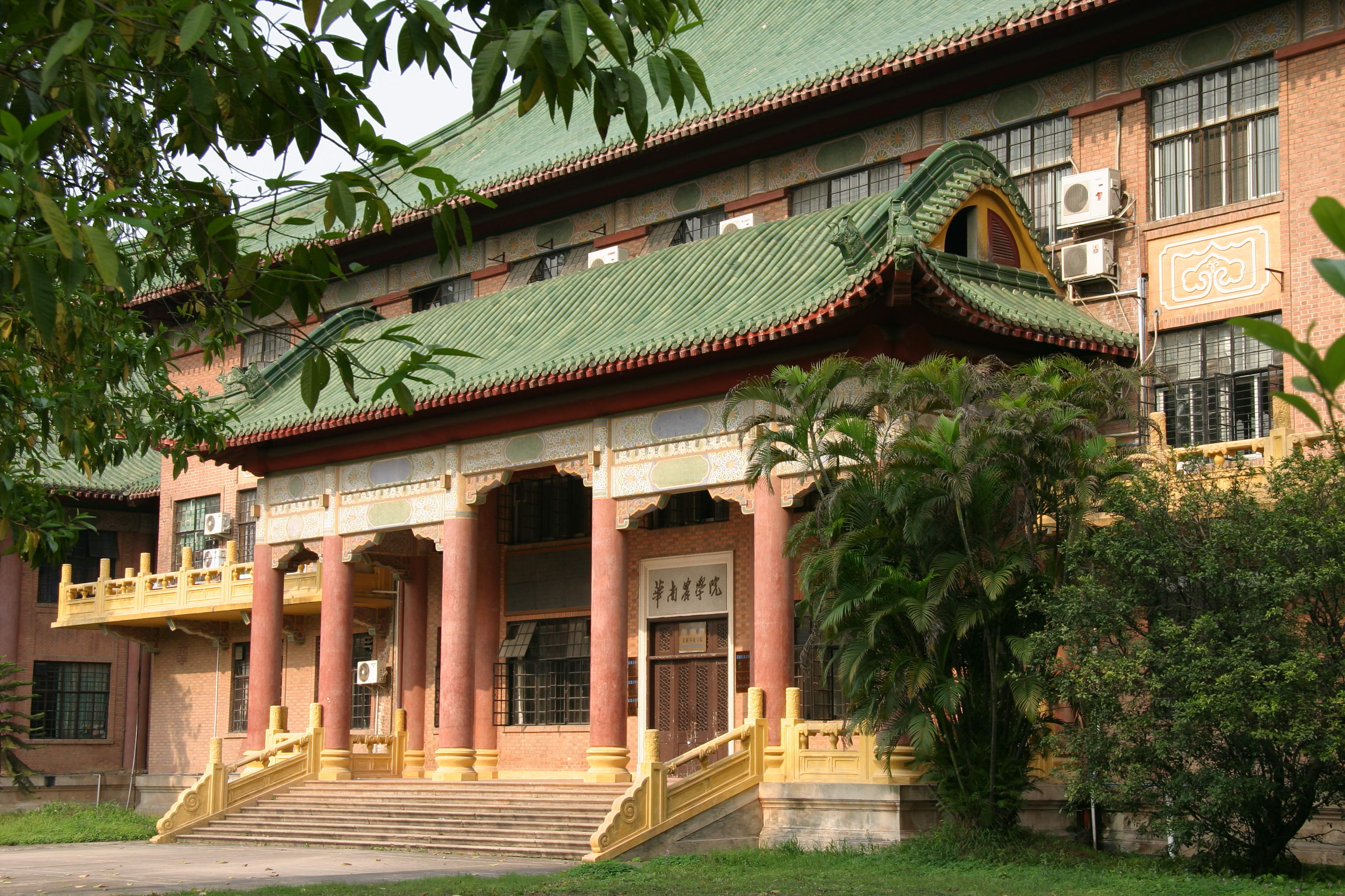 中文（中国大陆）: 华南农业大学5号楼（旧资源与环境学院院楼），原为国立中山大学理学院生物地质地理教室，建于民国二十三年（1934）10月19日。